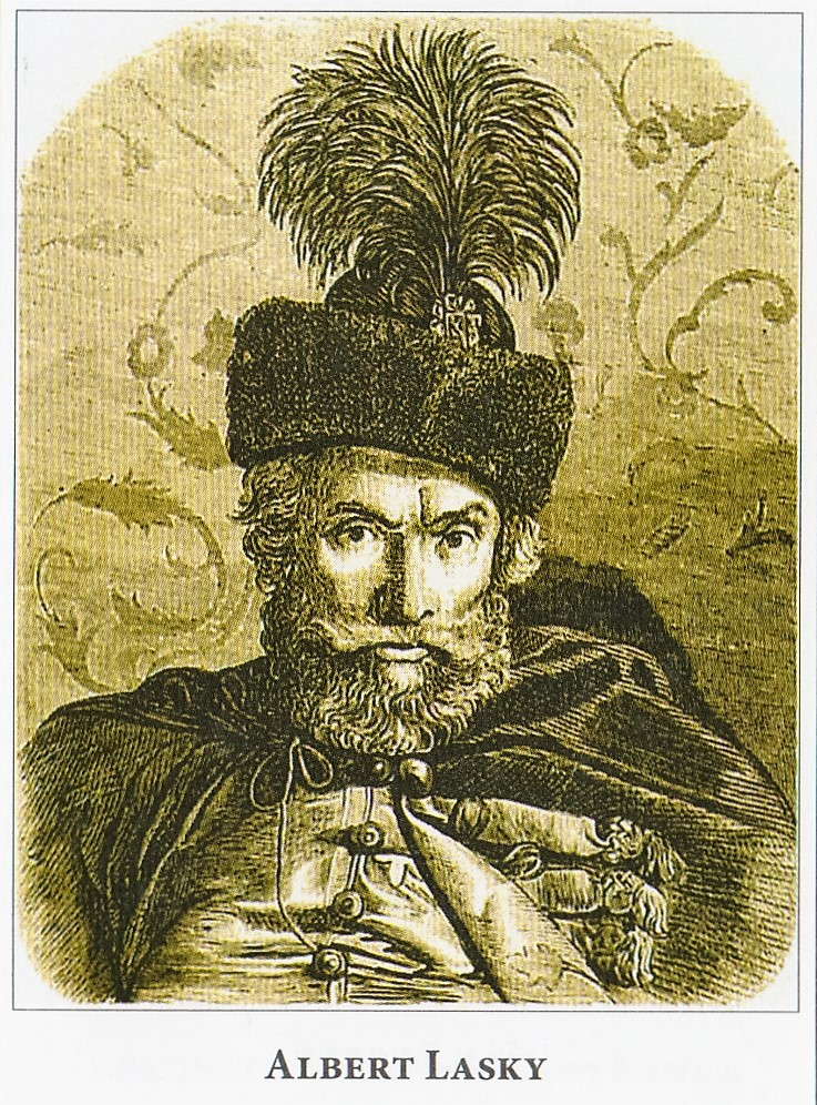 Albert Lasky (1536 – 1605) bol majiteľom mestského hradu v Kežmarku a manželom Beaty Laskej - Kościelskej (* 1515 – † 1576, Košice) prvej známej ženy, ktorá navštívila vysokohorské prostredie Vysokých Tatier. Otcom Alberta bol Hieronym Lasky (1496 – 1541), ktorý pochádzal z bohatej poľskej šľachtickej rodiny. Meno odvodzoval od dedičného rodinného majetku Lask v oblasti Lodže.